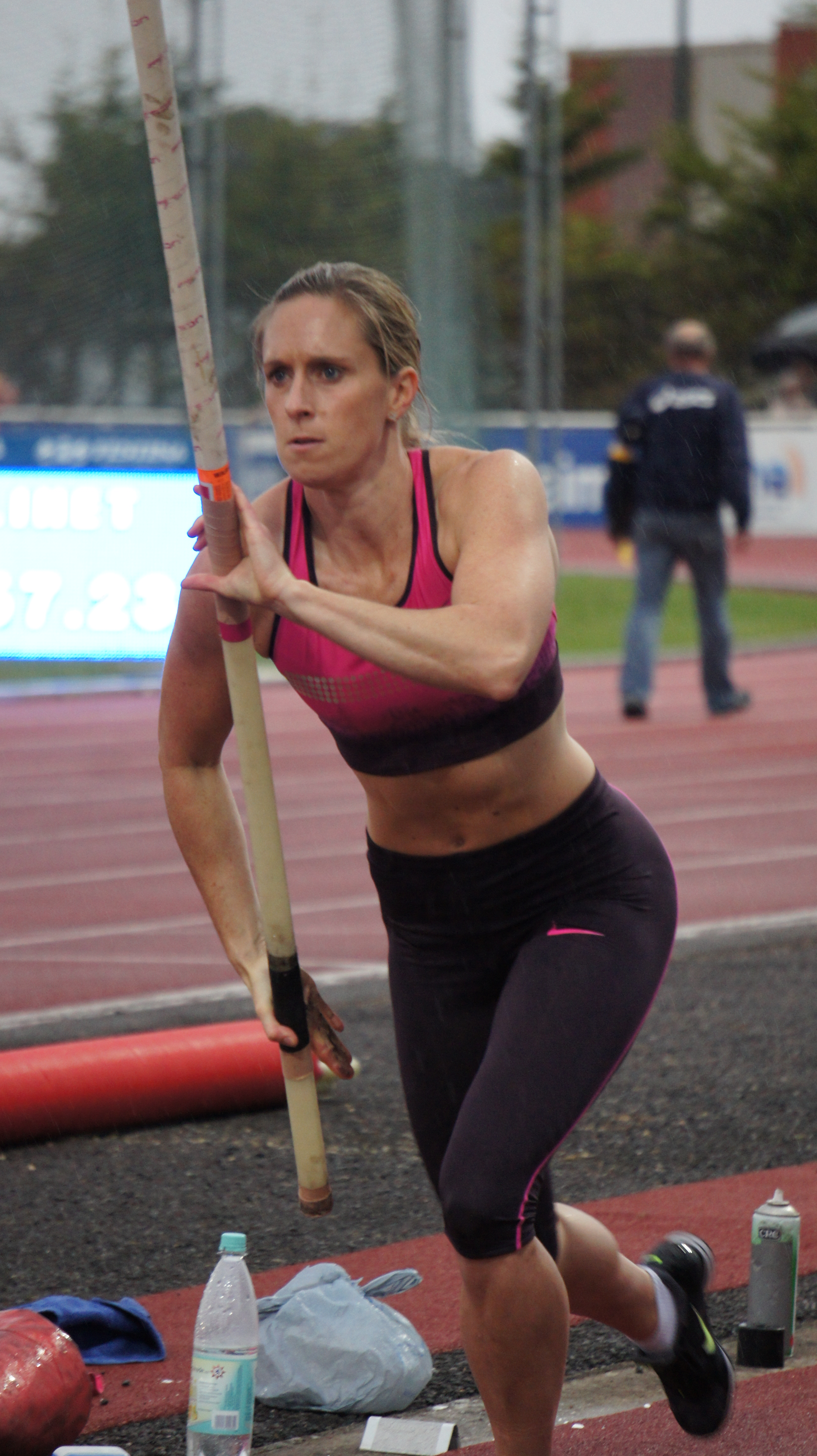 Rencontres d'athlétisme de Reims 2013 .